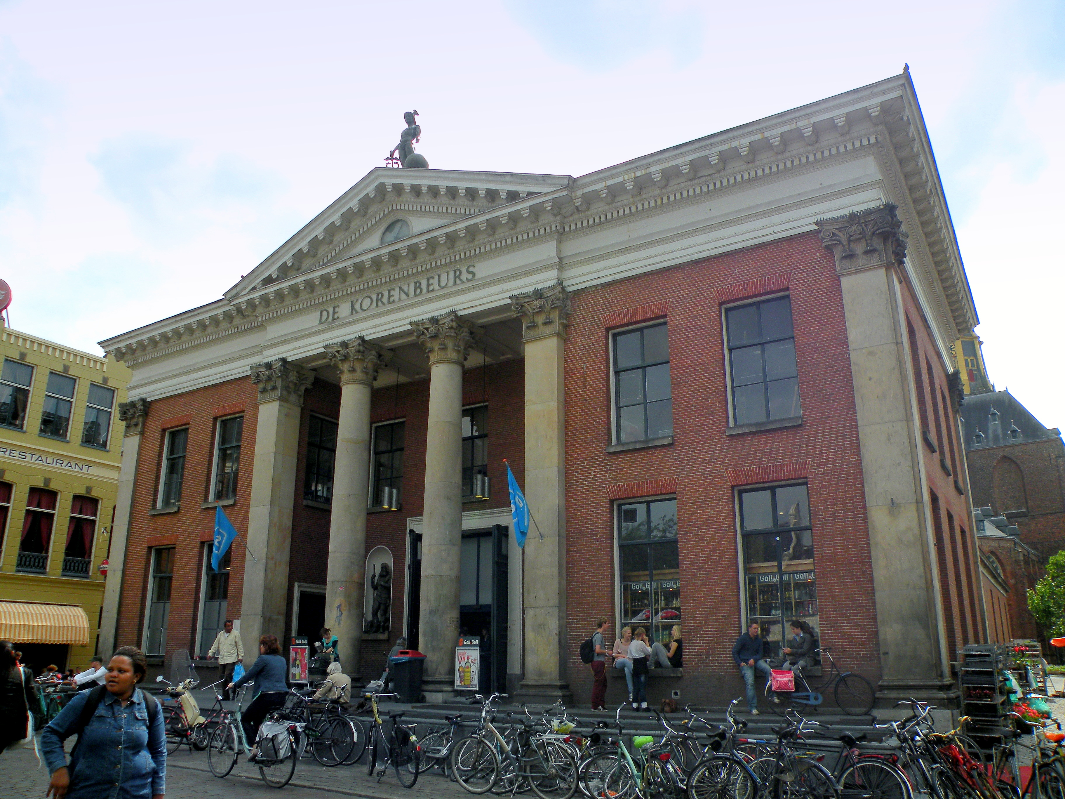 Groningen, Korenbeurs (2) RM-18415